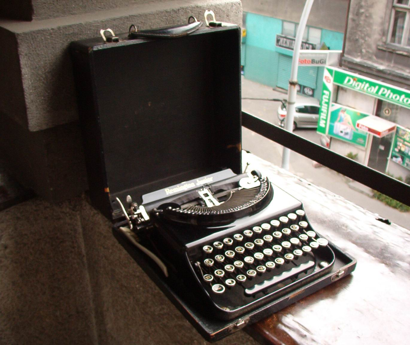 Писаћа машина, портабл, марке "Ремингтон" из 1936. године. Fotografisao Goldfinger. U javnoj upotrebi!